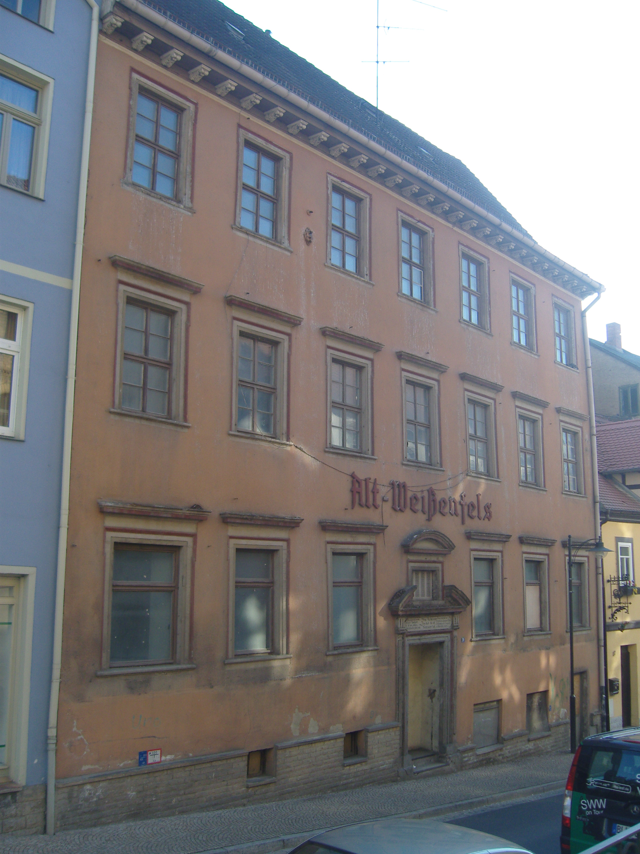 Denkmalgeschütztes Gebäude in Weißenfels in der Großen Burgstraße 19